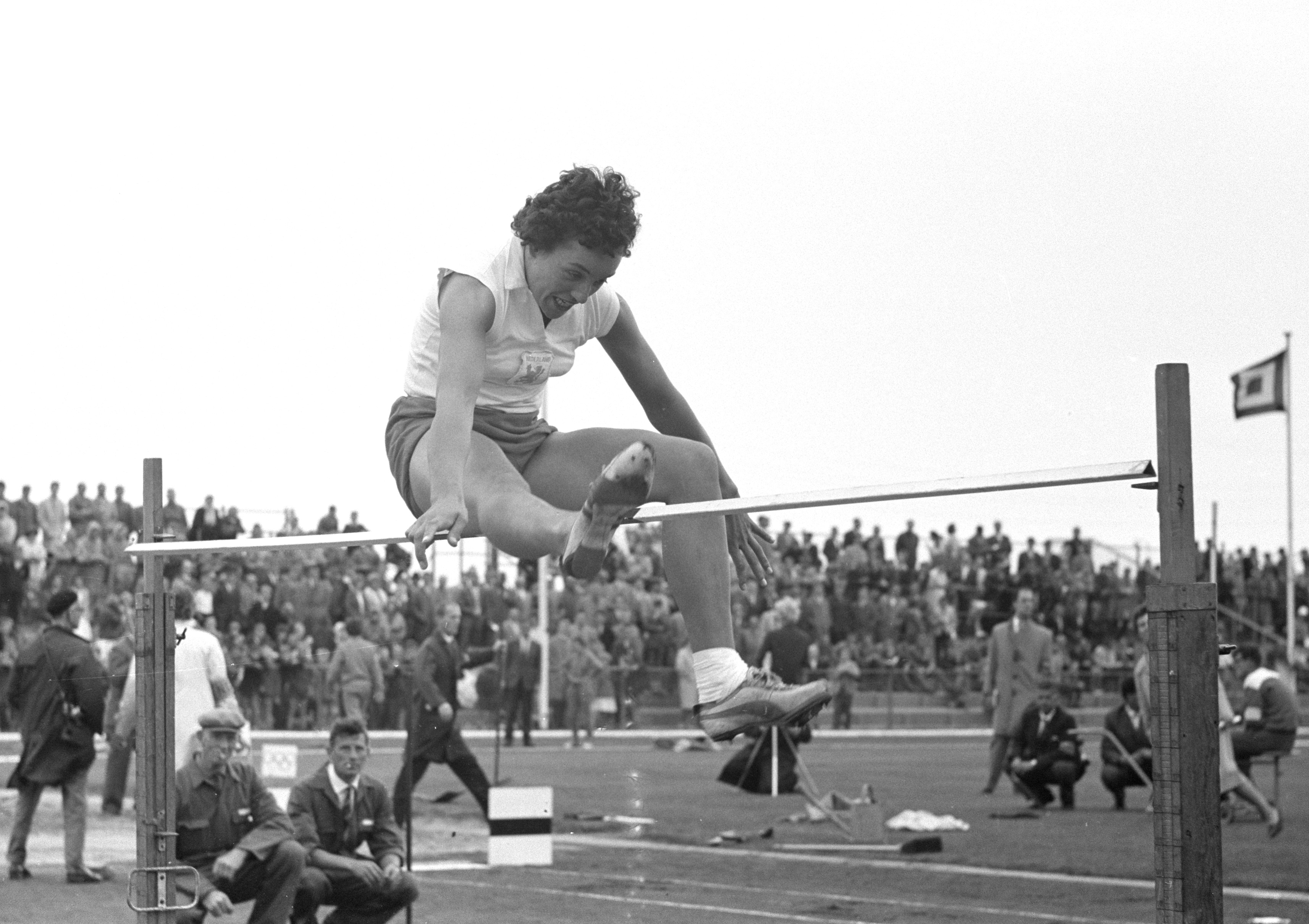 Atletiek Nederland tegen Oost-Duitsland. Hoogspringen Nel Zwier